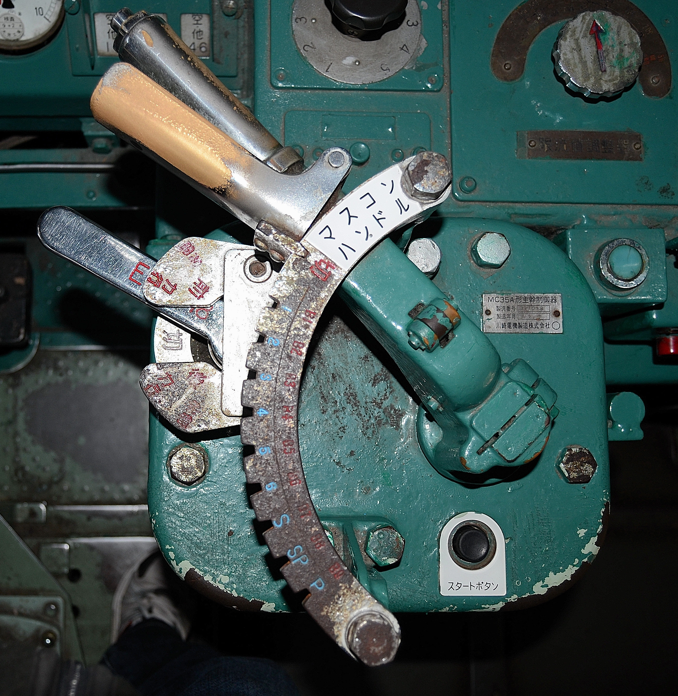 EF63のマスターコントローラー（碓氷峠鉄道文化むらでCGによる本格運転シミュレーターで使用されているEF63 18の運転室で撮影。）